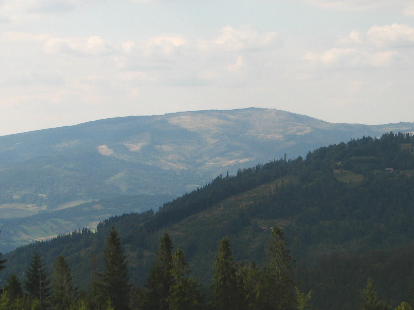 Barania Góra widziana z Hali Boraczej, na pierwszym planie stok Prusowa.